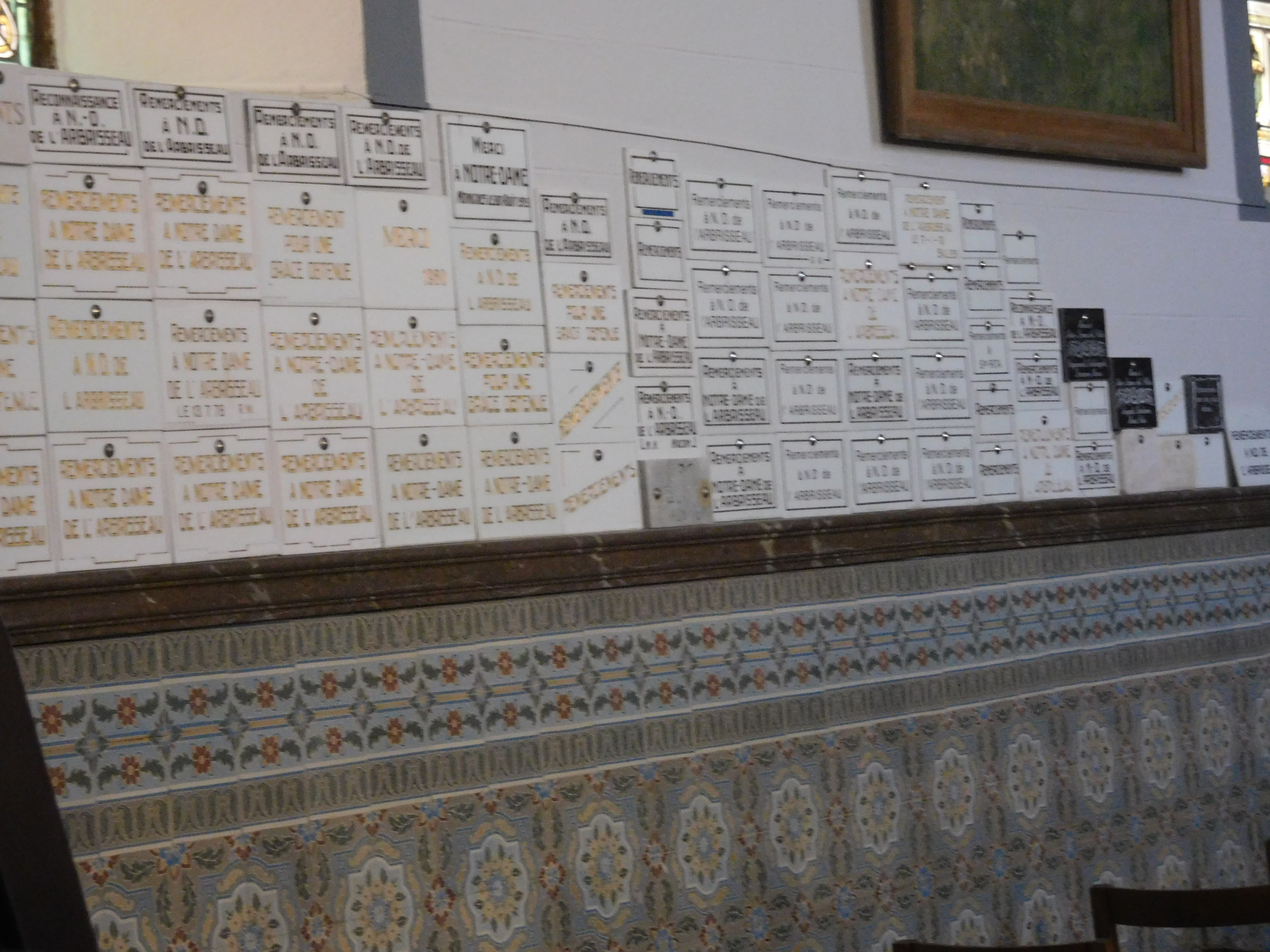 Des ex-votos sur un mur de la chapelle Notre-Dame del Pilar à Salles, près de Chimay (Belgique)